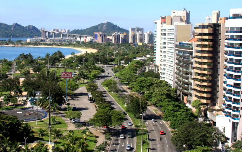 A foto foi tirada tendo em vista que o aniversário de Vitória se aproximava. Amo minha cidade e adoro fotografá-la.